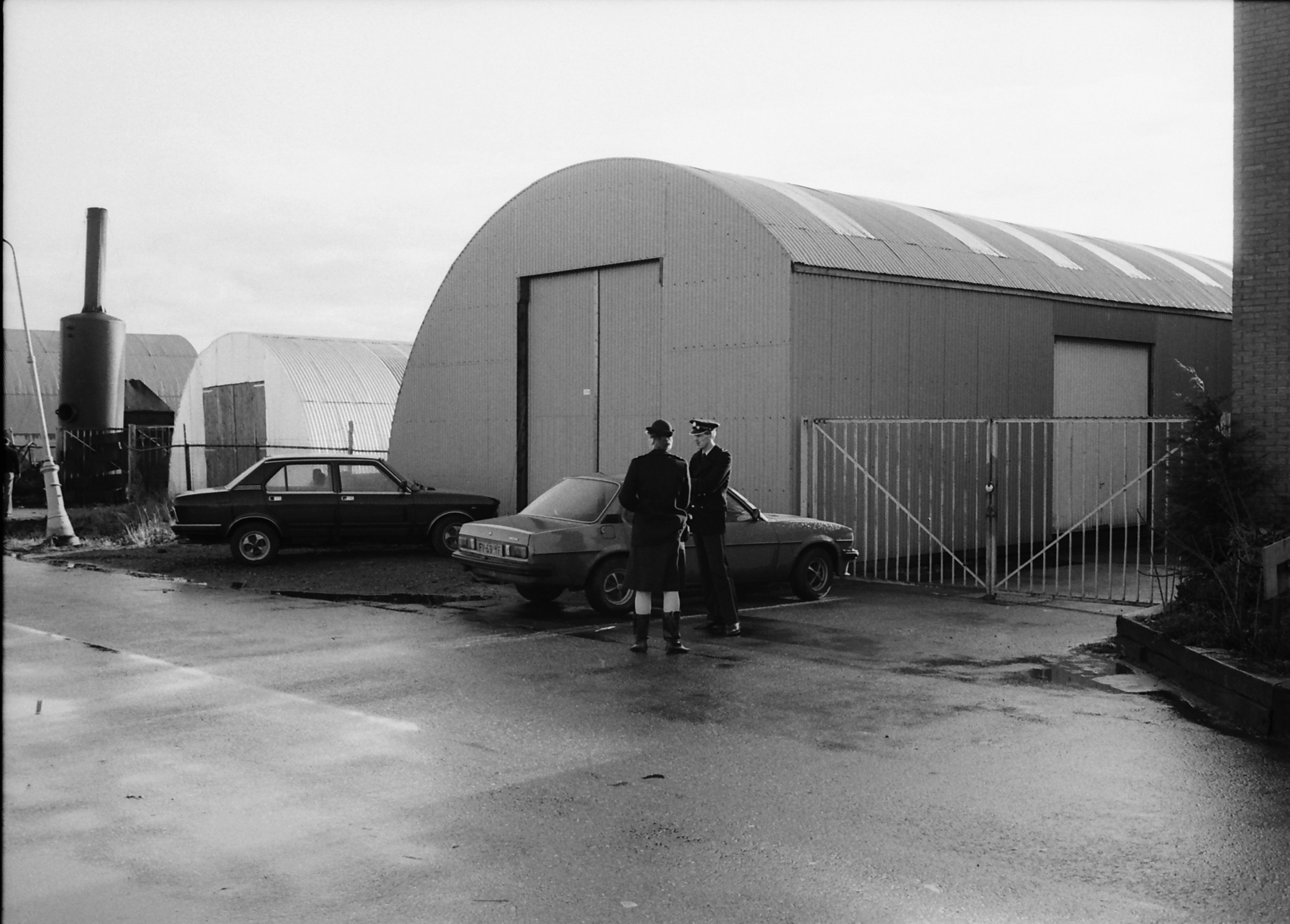 CollectieCollectie Fotoburo de BoerInventarisnummerNL-HlmNHA_1478_23627 K_28NL-HlmNHA_1478_23627 K_30BeschrijvingPlaats aan de Heiningenstraat in Amsterdam waar Freddy Heineken en Ab Doderer vast hebben gezeten na hun ontvoering, 30 november 1983VervaardigerFotopersbureau de Boer LandNederland ProvincieNoord-Holland GemeenteAmsterdam PlaatsAmsterdam StraatHeiningenstraat Begindatum30-11-1983Einddatum30-11-1983